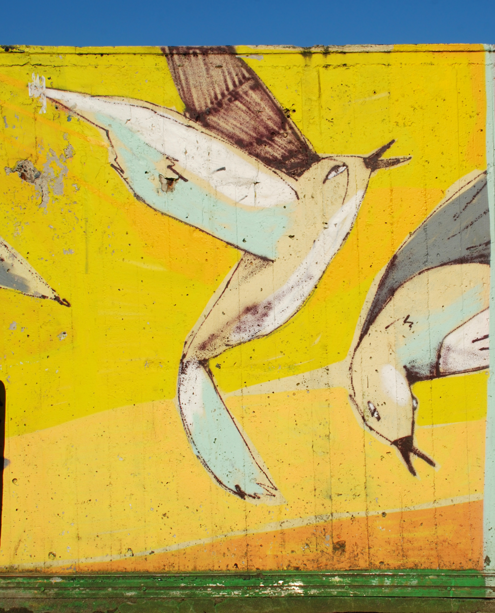 Belgique - Louvain-la-Neuve - Gare - parapet - Fresque de Mart Aire (Kosmopolite Art Tour 2015 à Louvain-la-Neuve)